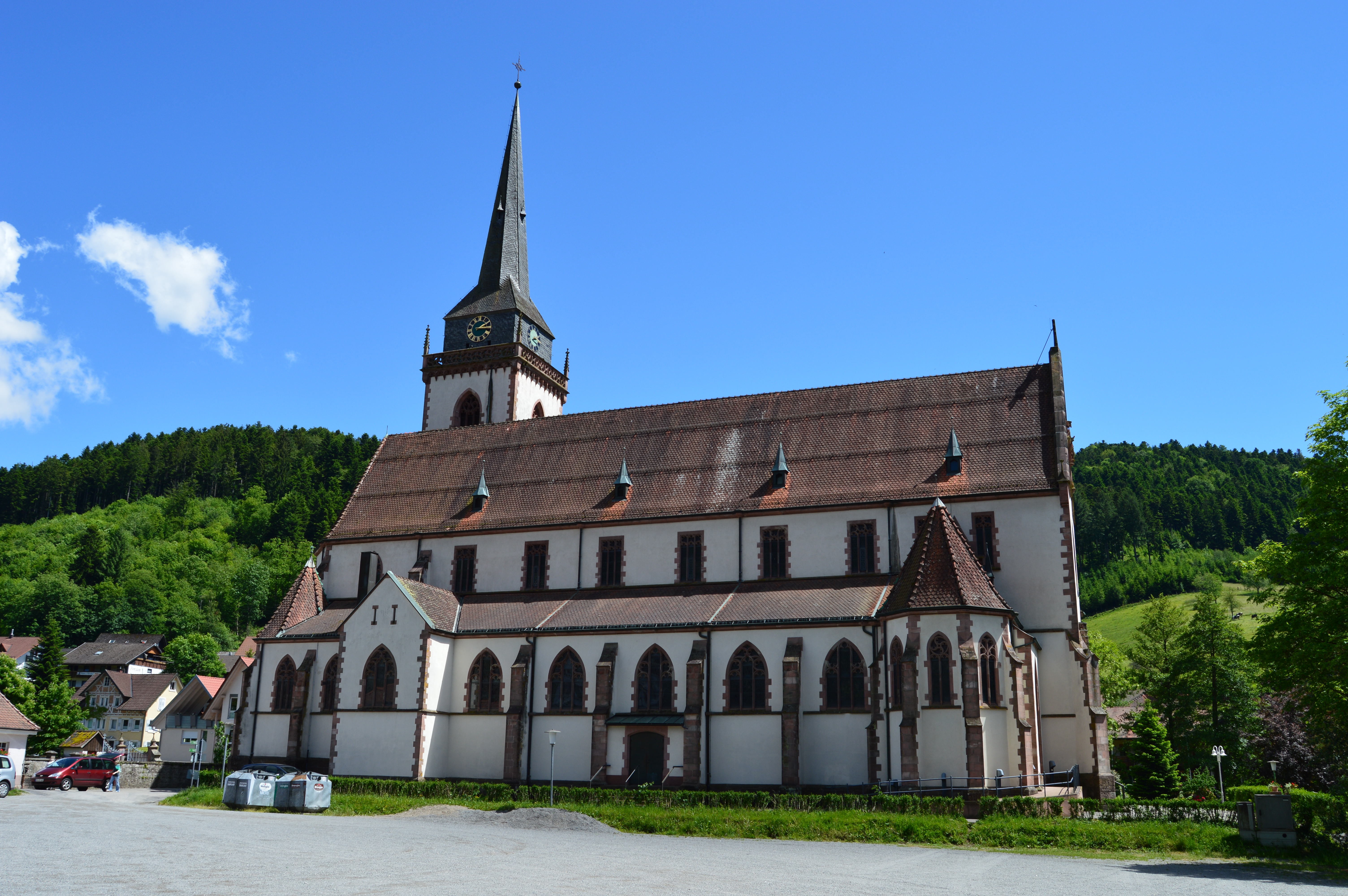 Die Pfarrkirche St. Ulrich von der linken Seite